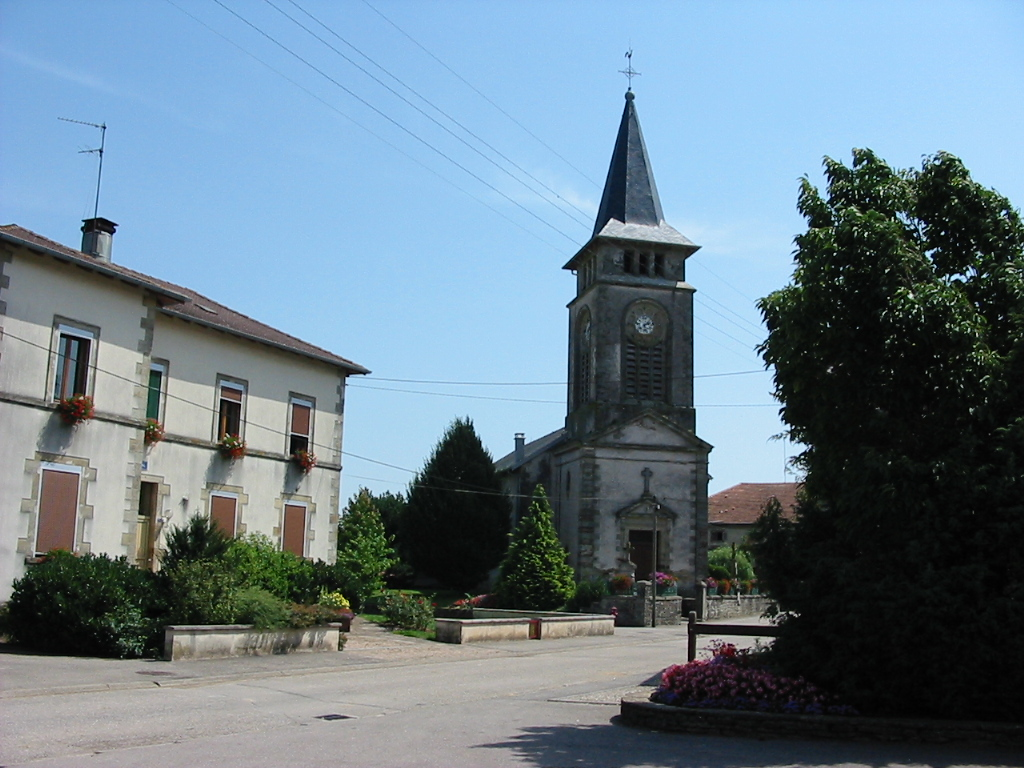 Doncières, commune des Vosges : mairie et église